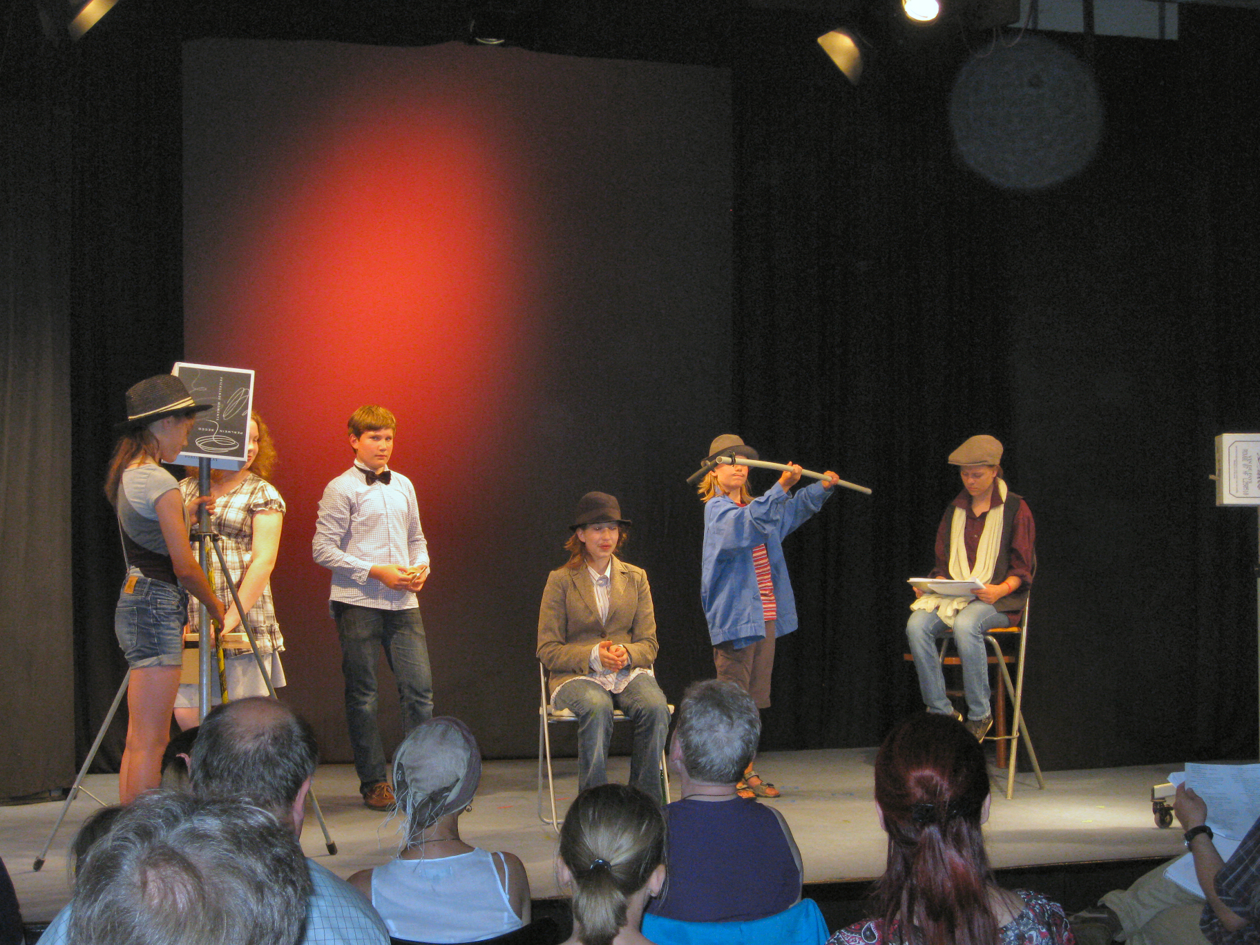 Szenenbild einer Aufführung im Wasserturm